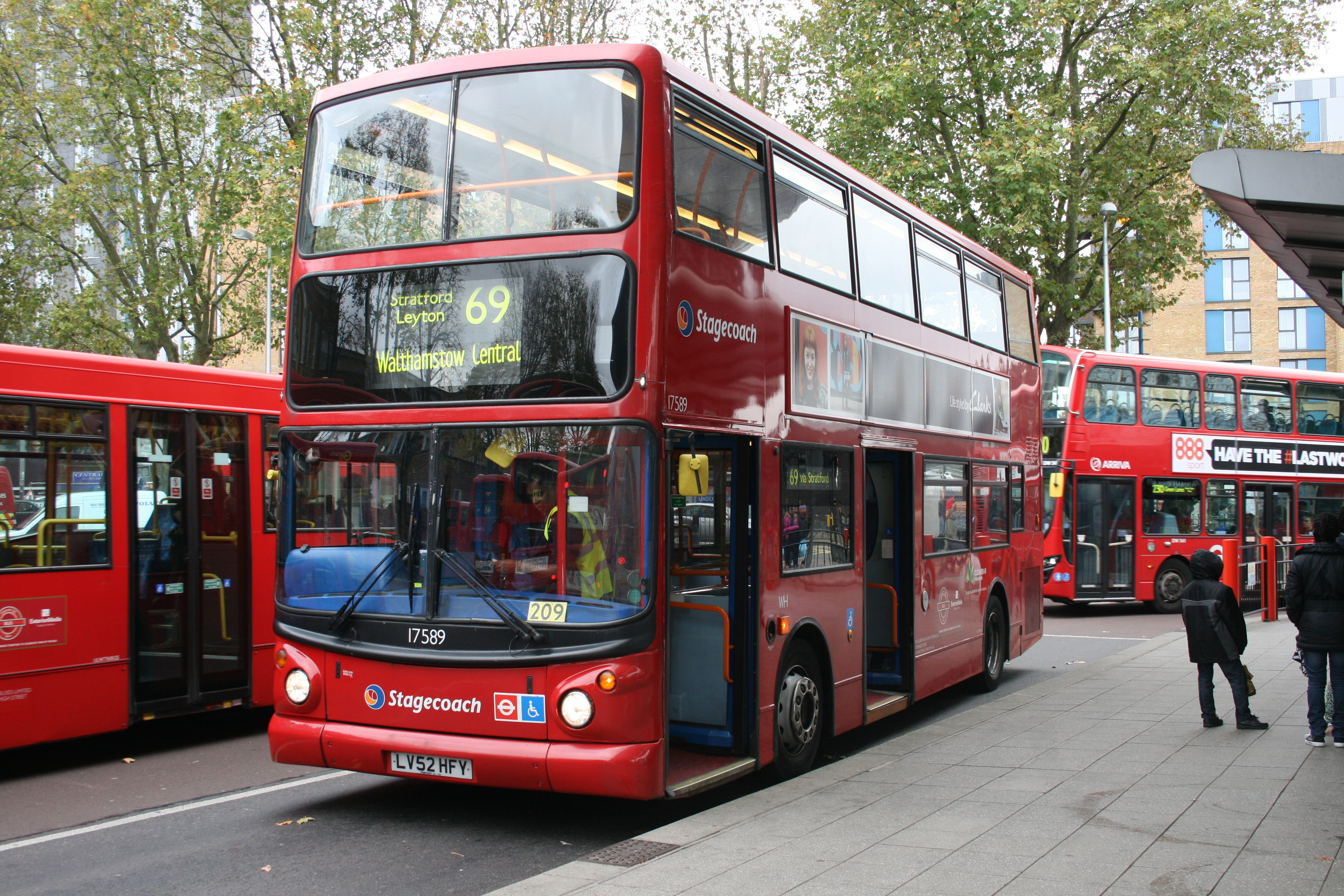 LV52 HFY